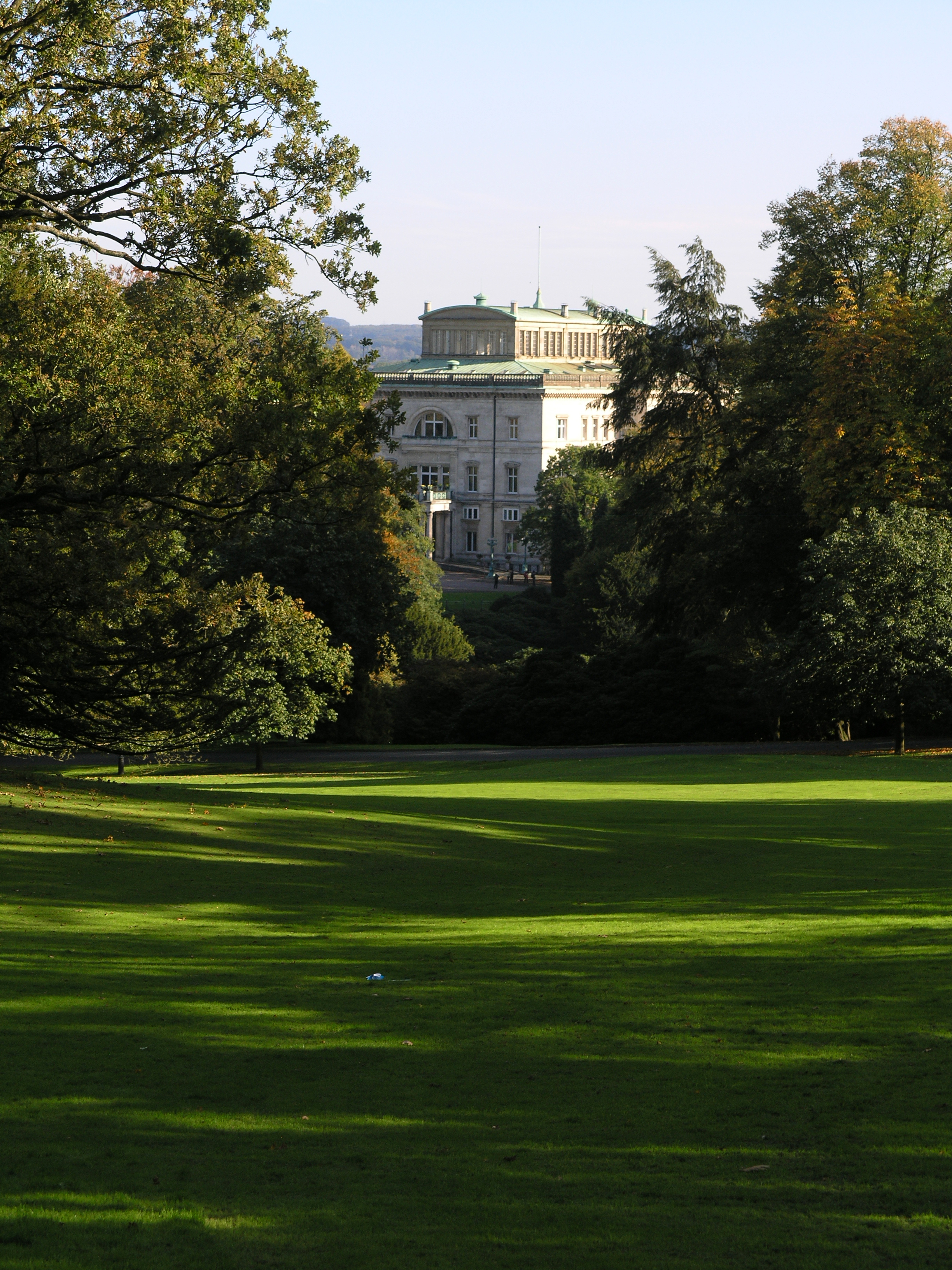 Северный Рейн - Вестфалия, Эссен - вилла Хюгель